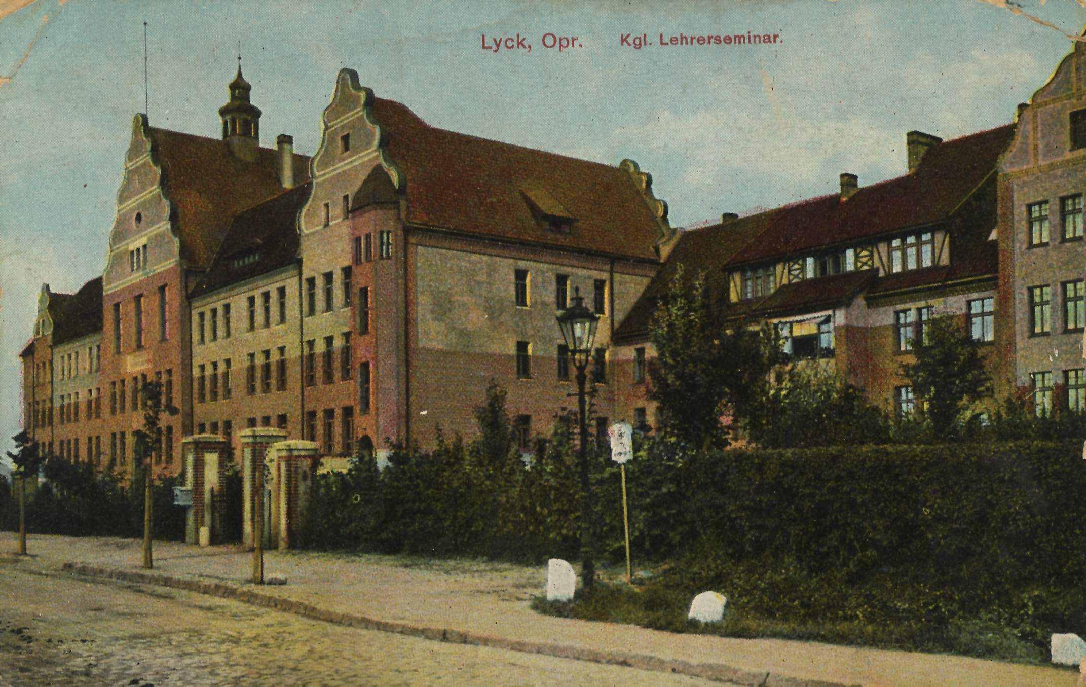 Kgl. Lehrerseminar